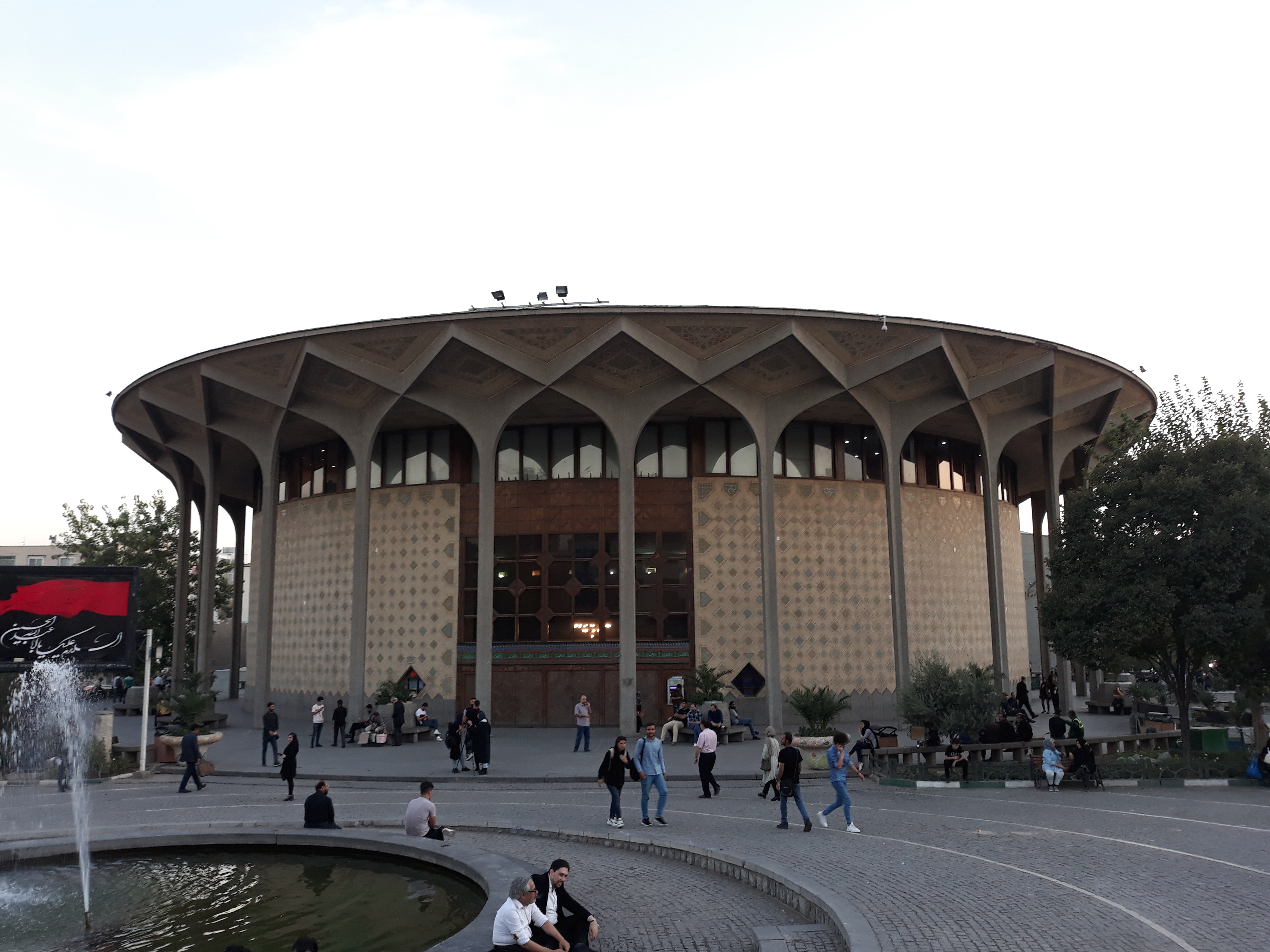 تئاتر شهر